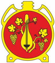 Герб села Городнє (Болградський район)